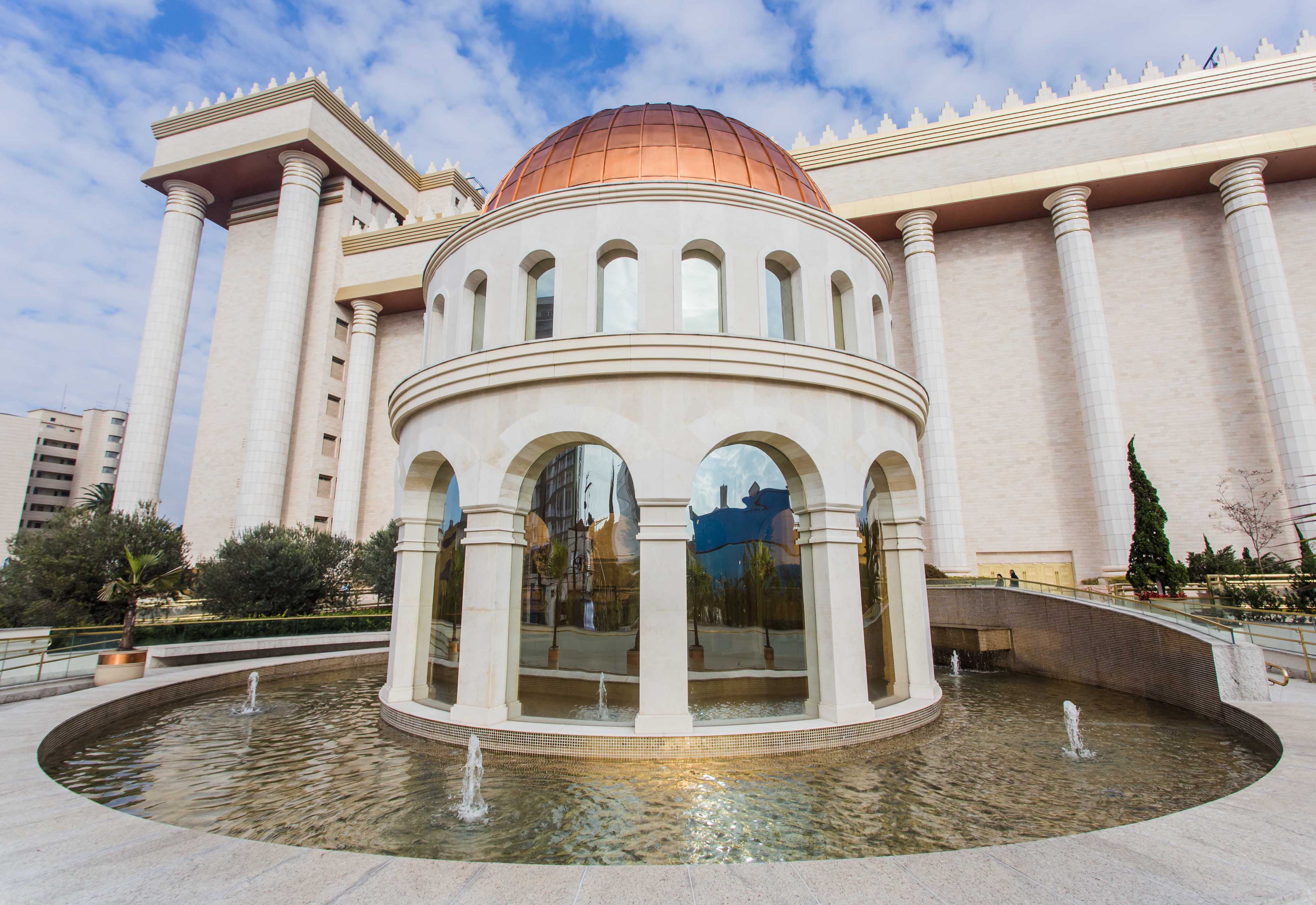 O Governador do Estado de São Paulo Geraldo Alckmin, participou da Solenidade de lançamento do selo Comemorativo dos 40 anos da Universal. Local: São Paulo/SP. Data: 07/07/2017. Foto: Alexandre Carvalho/A2img